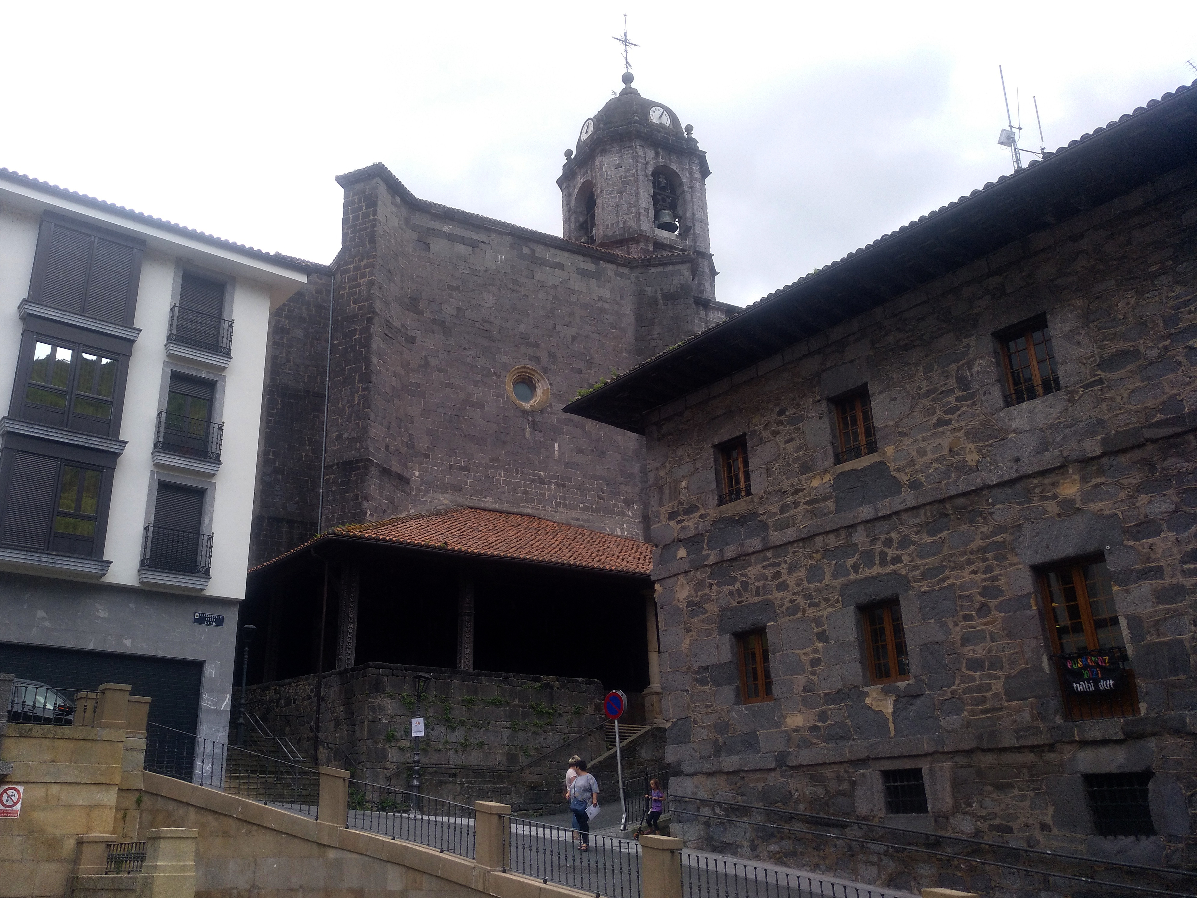 Andre Mariaren Jasokundearen eliza